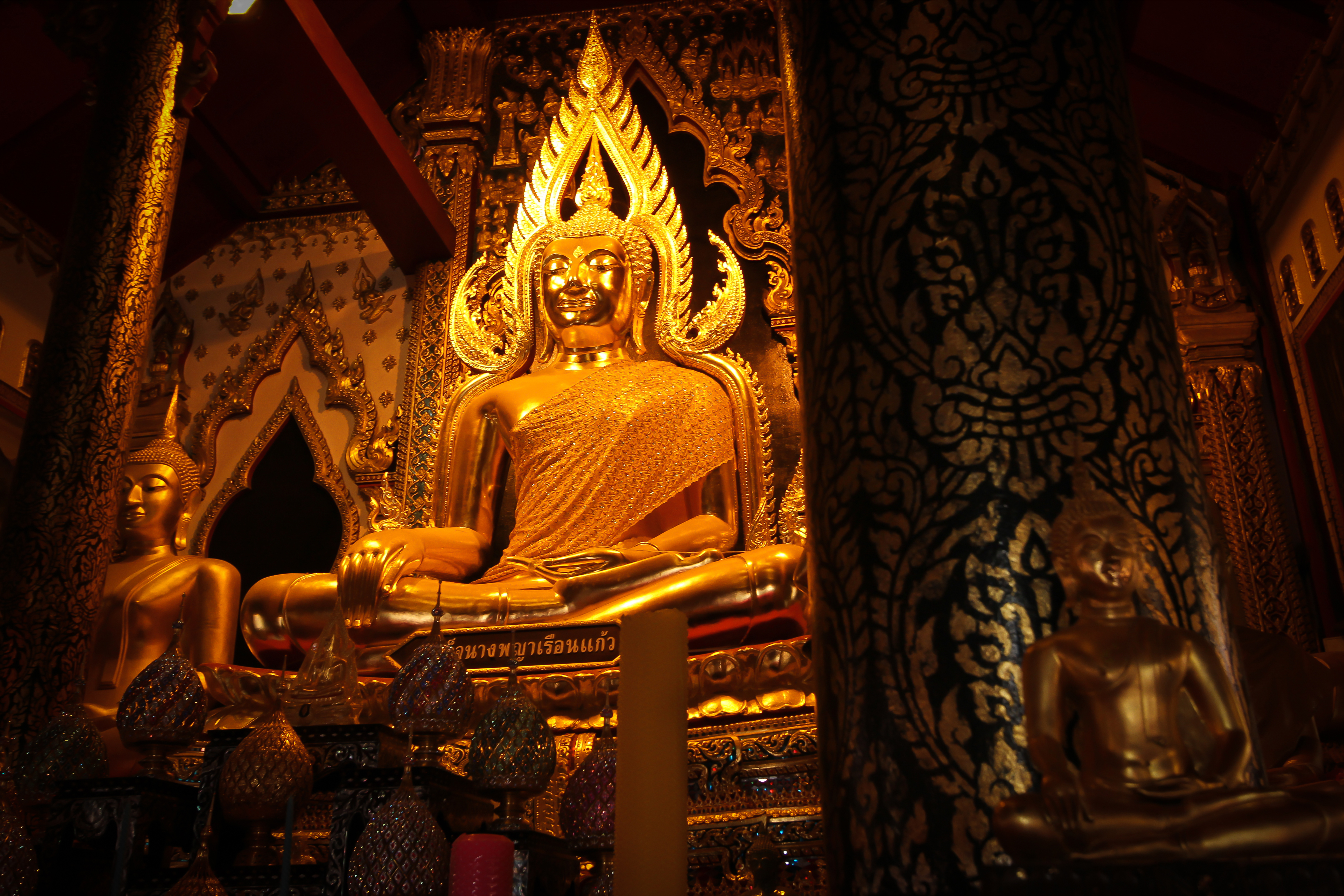 วัดนางพญา